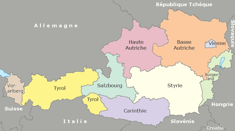 Fédération autrichienne (carte)